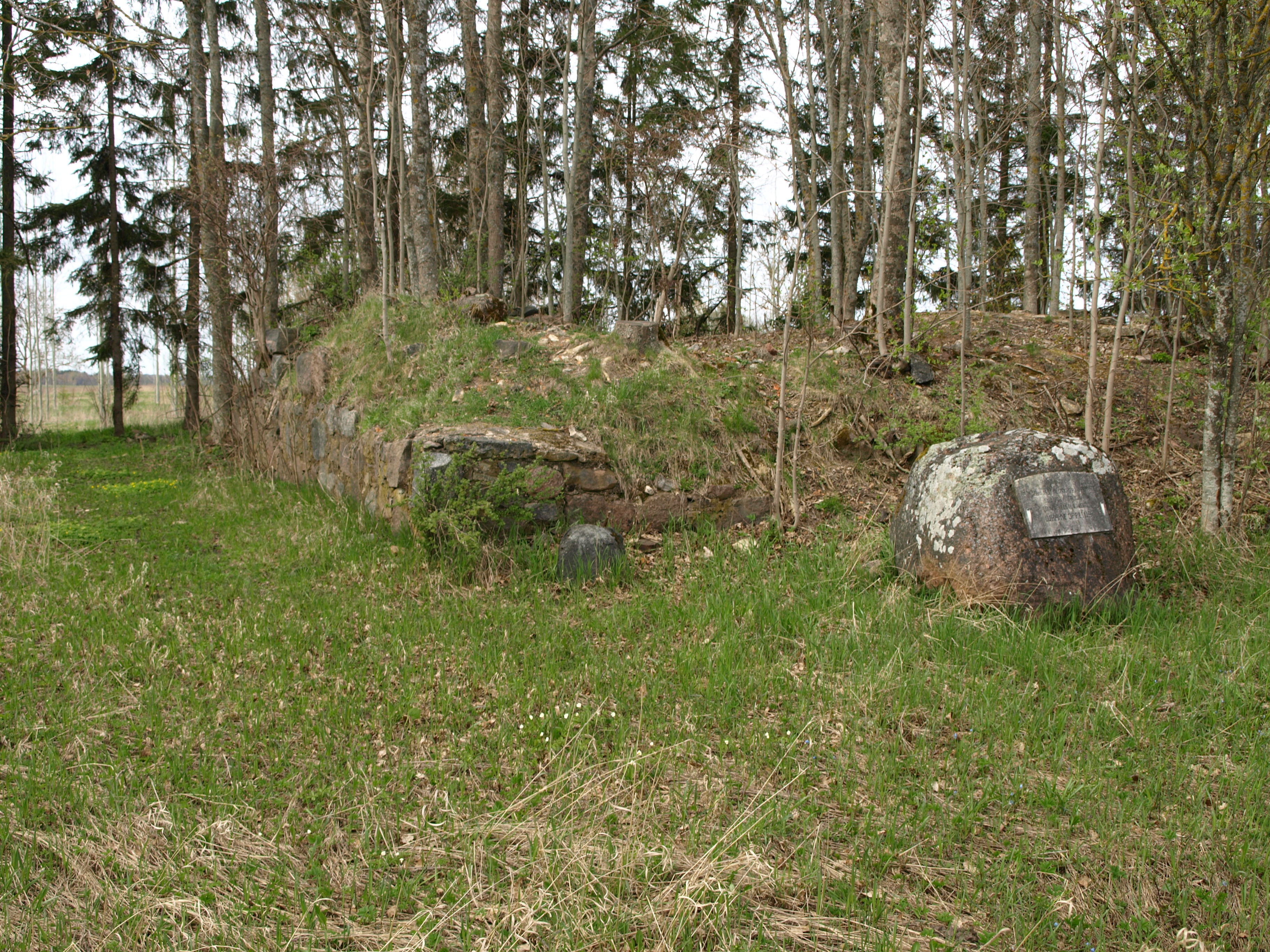 Hoone vare, kus aastail 1766-1789 asus trükikoda, milles 1766. aastal trükiti esimene eesti ajakiri "Lühhike öppetus"